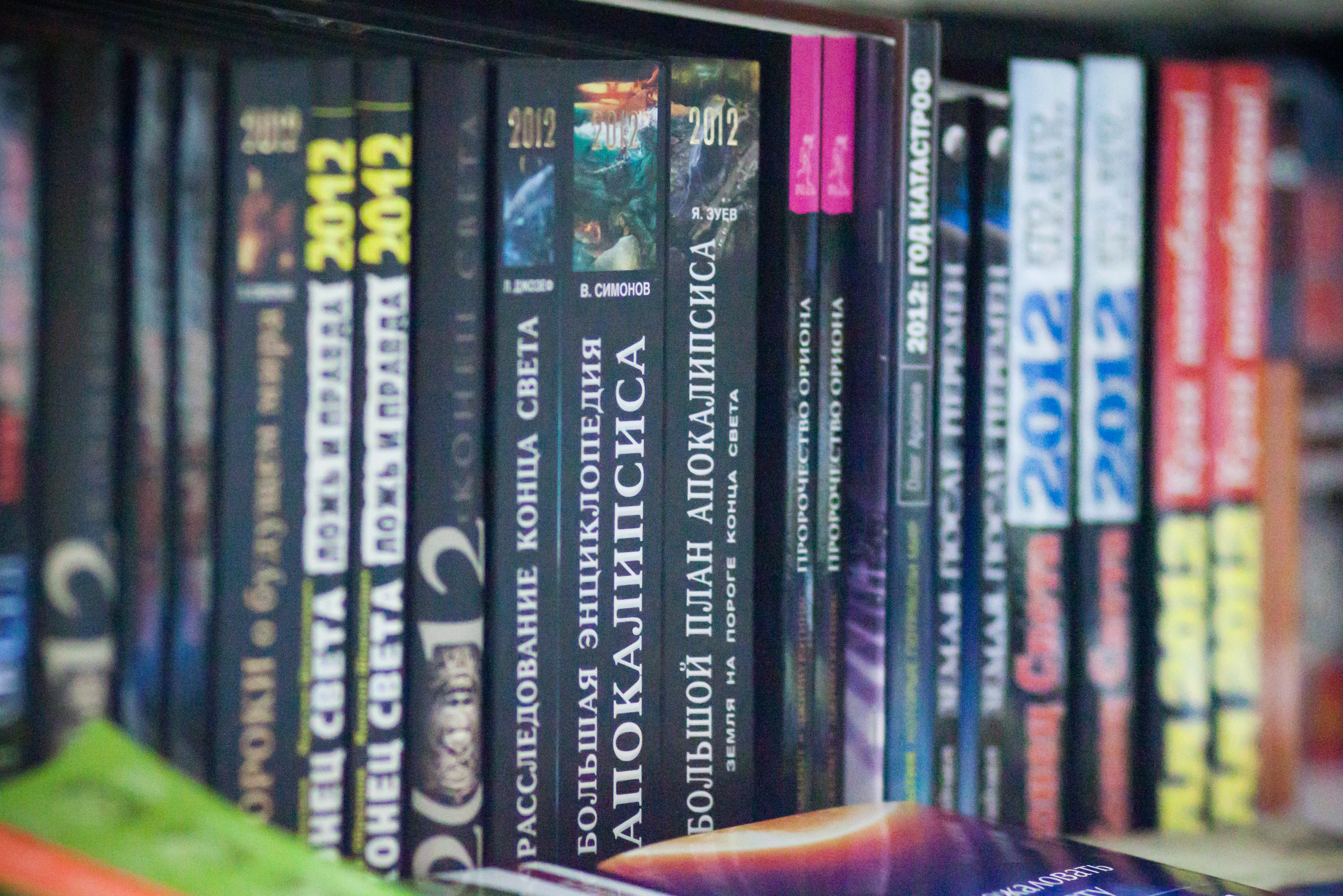 Полка в московском книжном магазине, полностью отведённая под литературу о 2012 годе